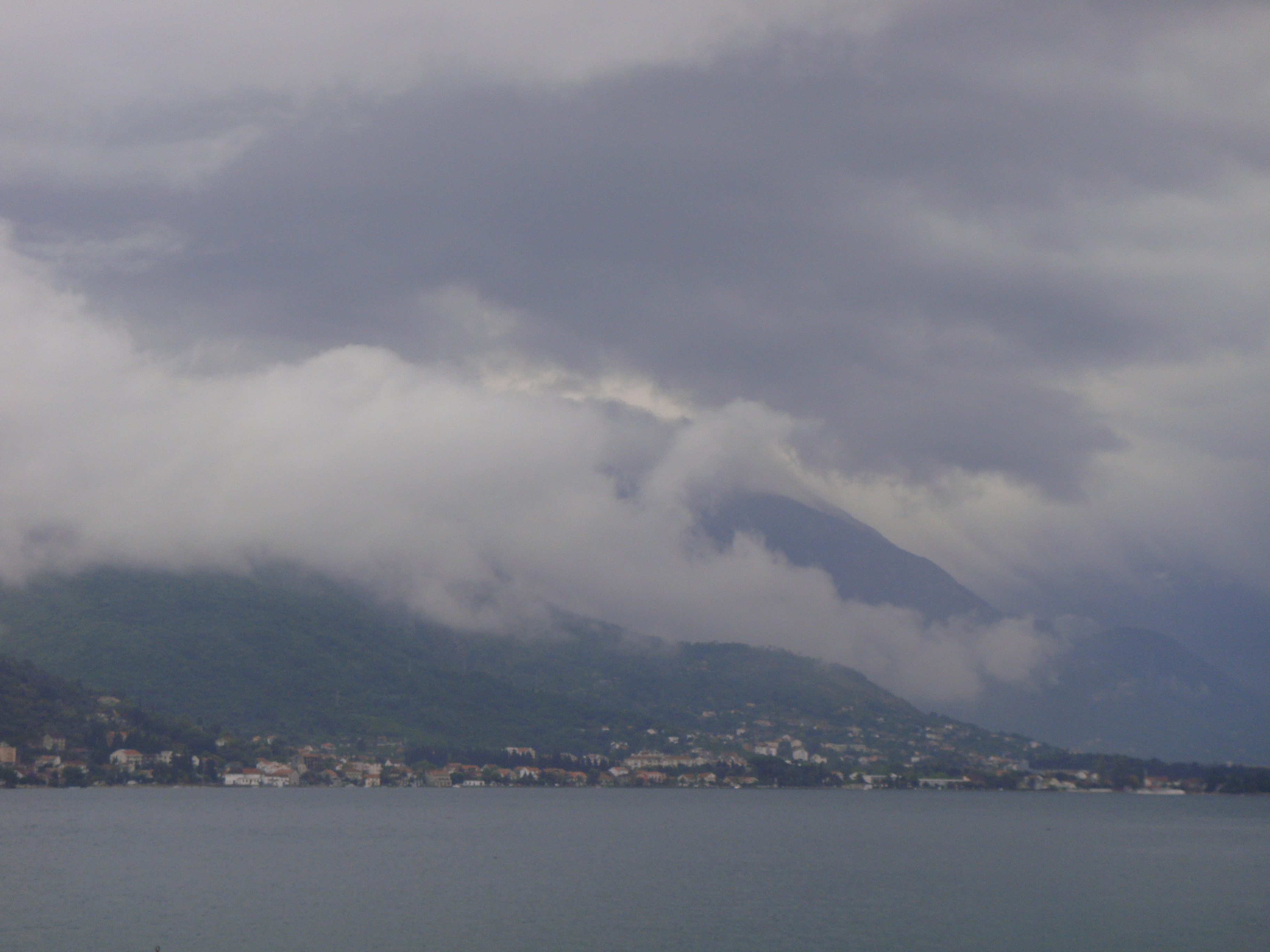 oluja 2